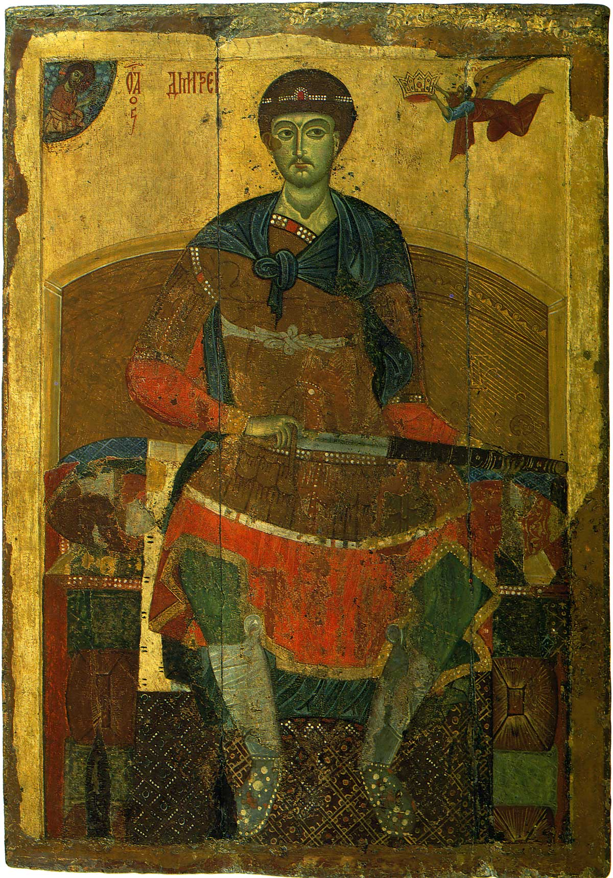 Russian icon of saint Demetrius; the palladium of Dmitrov Неизвестный иконописец, XII - начало XIII века Дмитрий Солунский Конец XII – начало XIII века Дерево, темпера 156 х 108